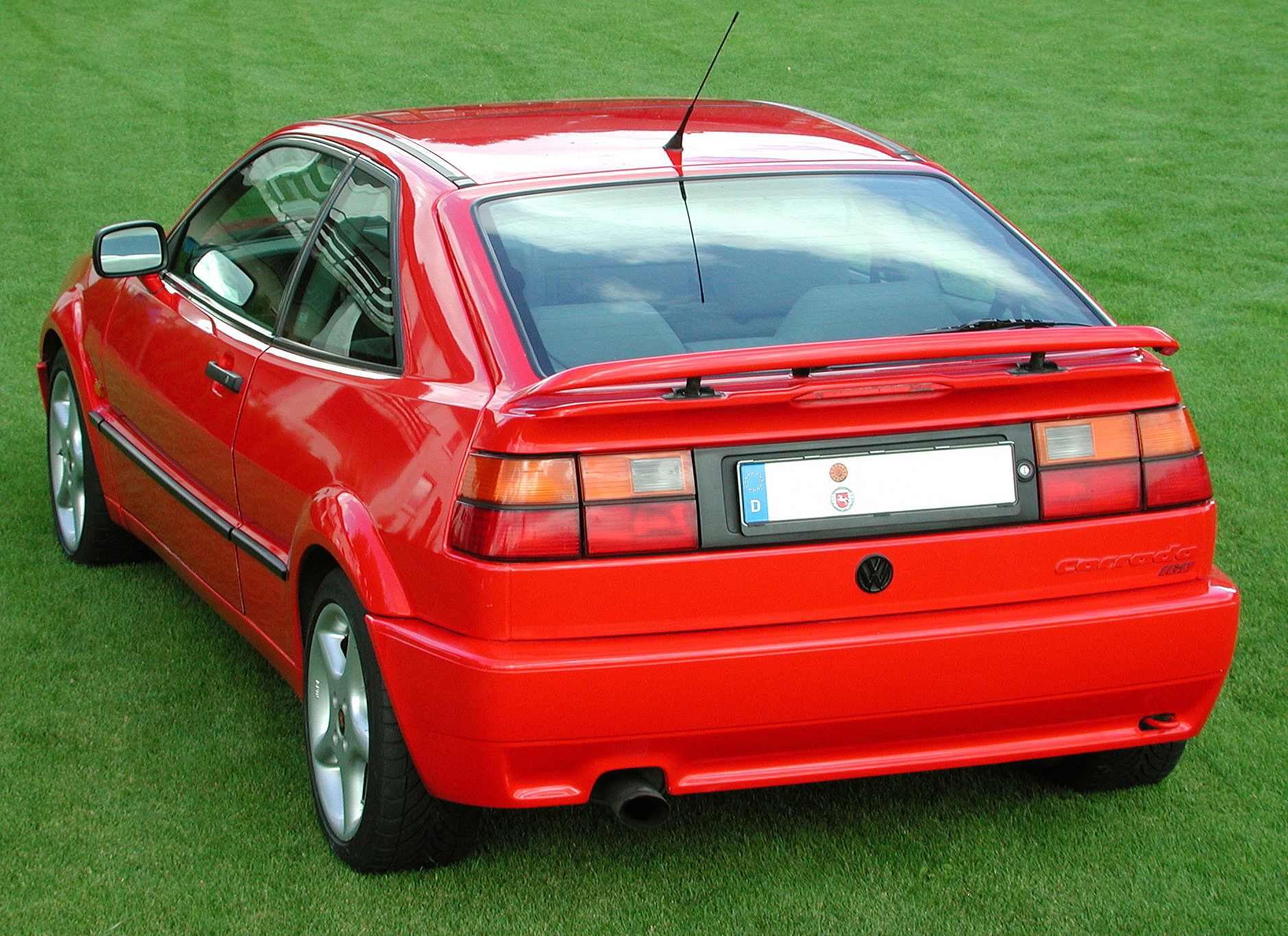 VW Corrado 16V 100kW Baujahr 1992, bis auf Felgen original (seitliche Heckansicht)